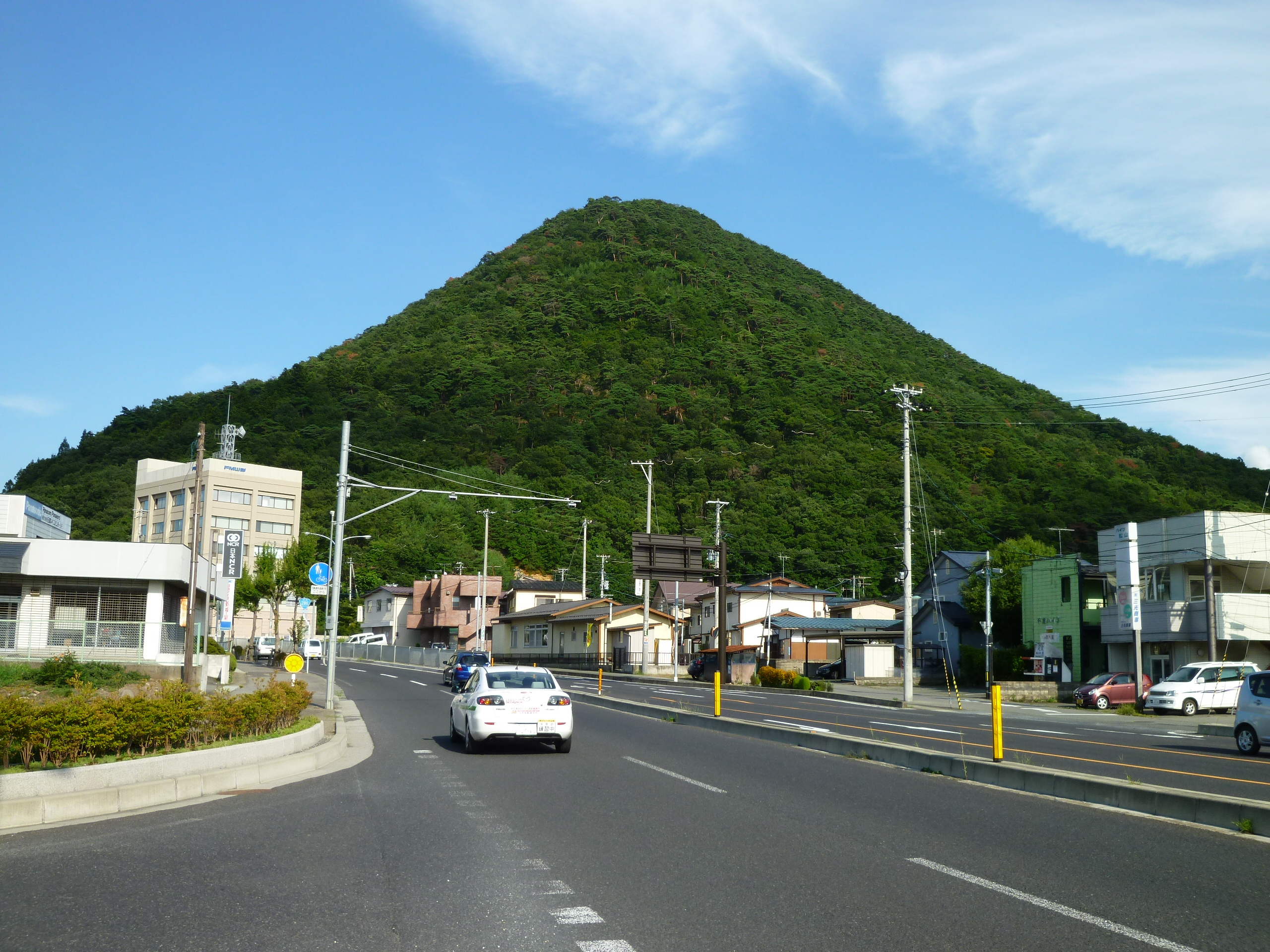 千歳山（山形市松山から）